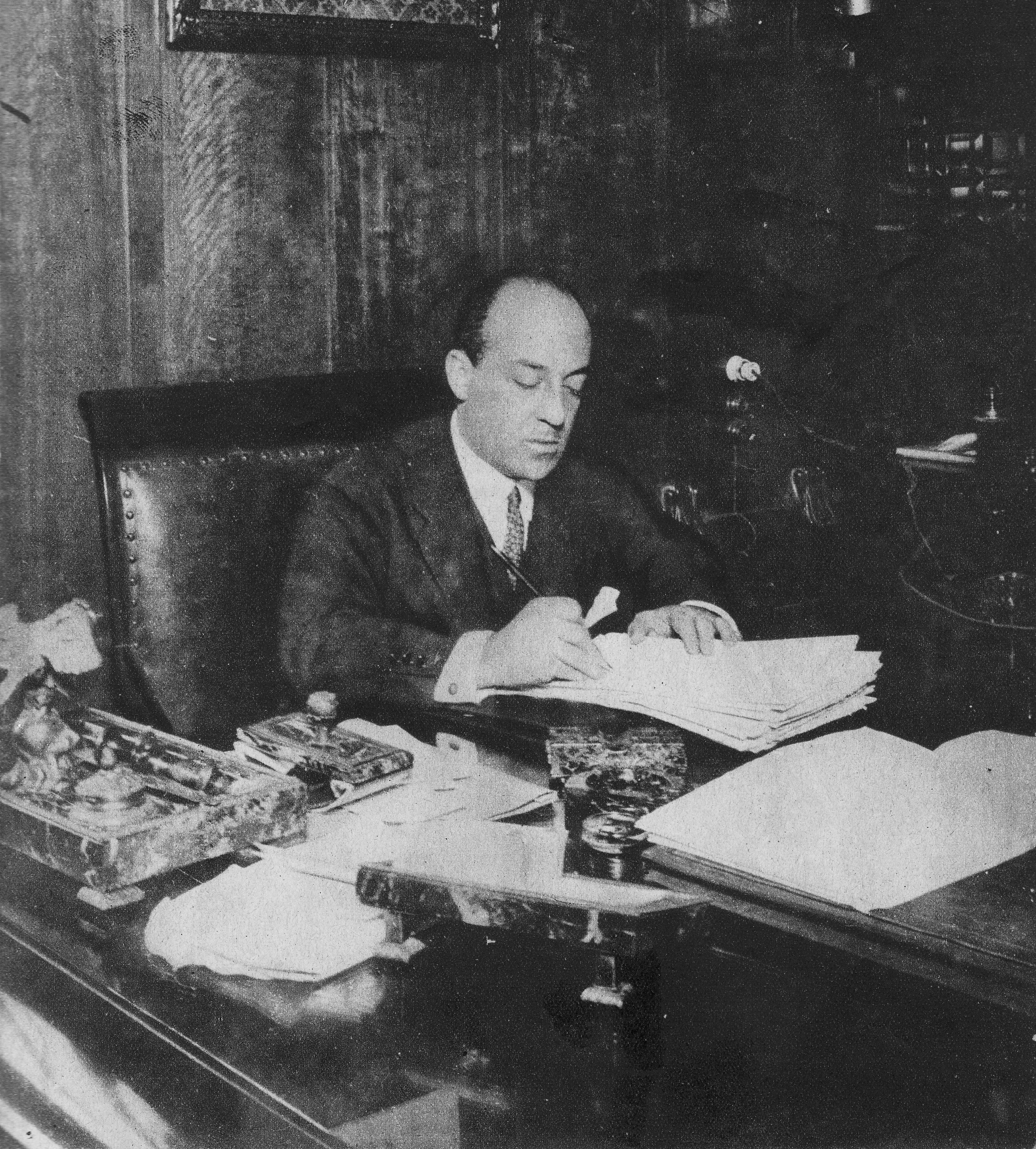 Darius Rumeu i Freixa, Polític. Fundador de la Unión Monárquica Nacional. President de la Diputació de Barcelona (1893-1903), Alcalde de Barcelona (1925-1929).